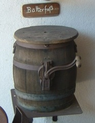 Schlagbutterfass, offene Ausstellung in der Lochmühle, Wehrheim